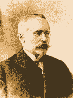 Vysokovych Volodymyr Kostyantynovych portrait